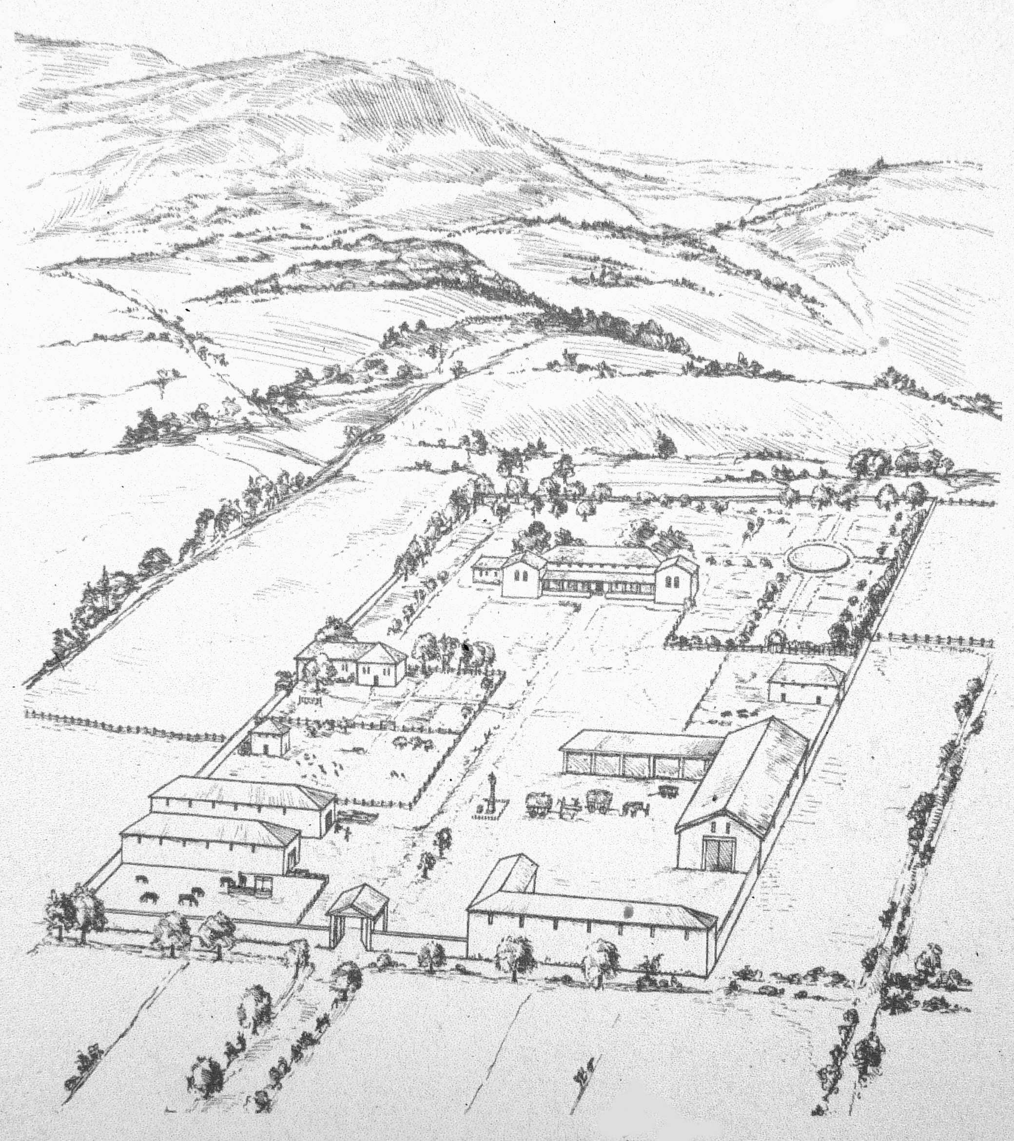 Zeichnerische Rekonstruktion einer Villa Rustica